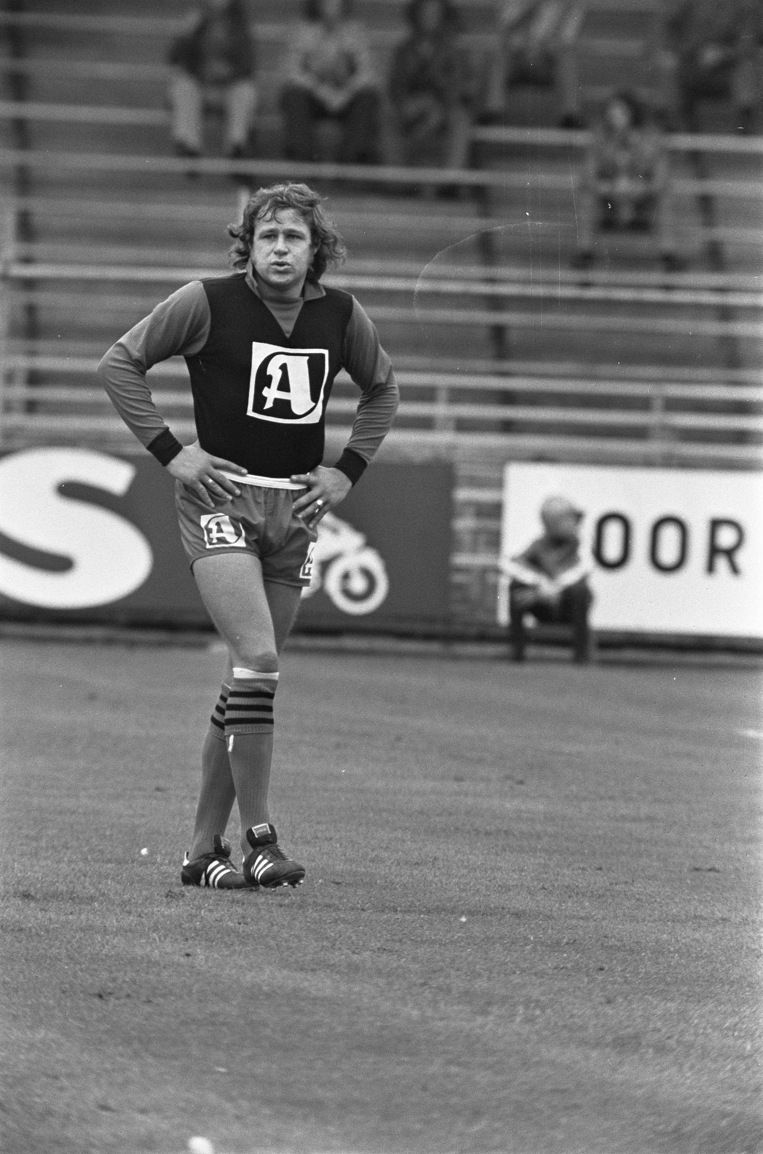 Ajax tegen Excelsior 2-0, Rinus Israel met Akai-reclame Excelsiorshirt.